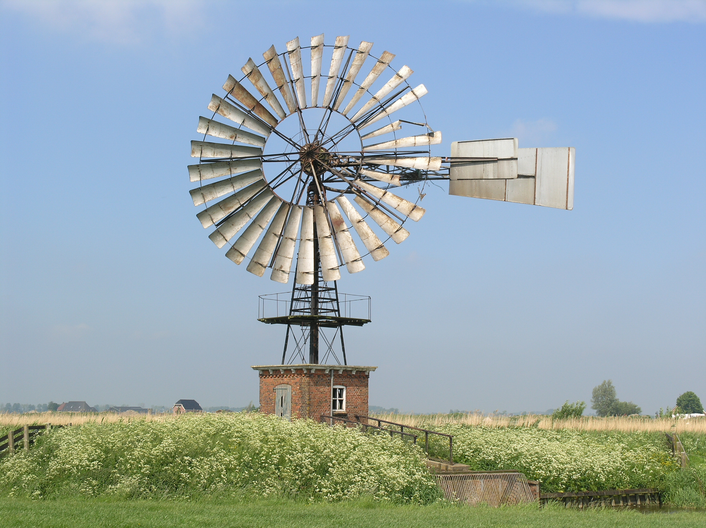 Stroobos Windmotor Poldermolen